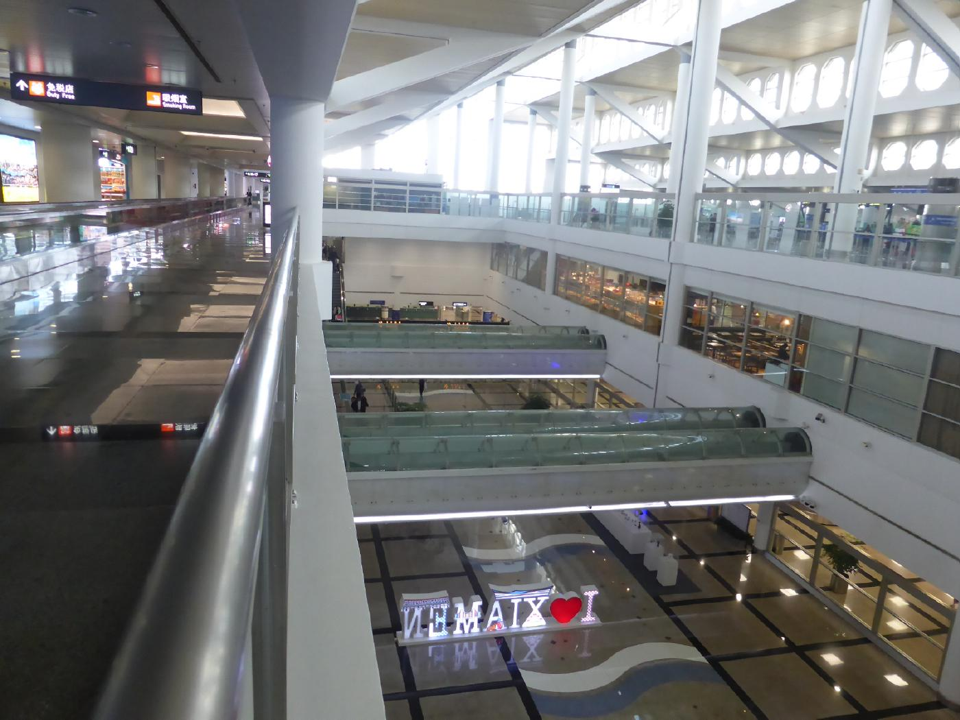 アモイ空港3F国際線出発フロア